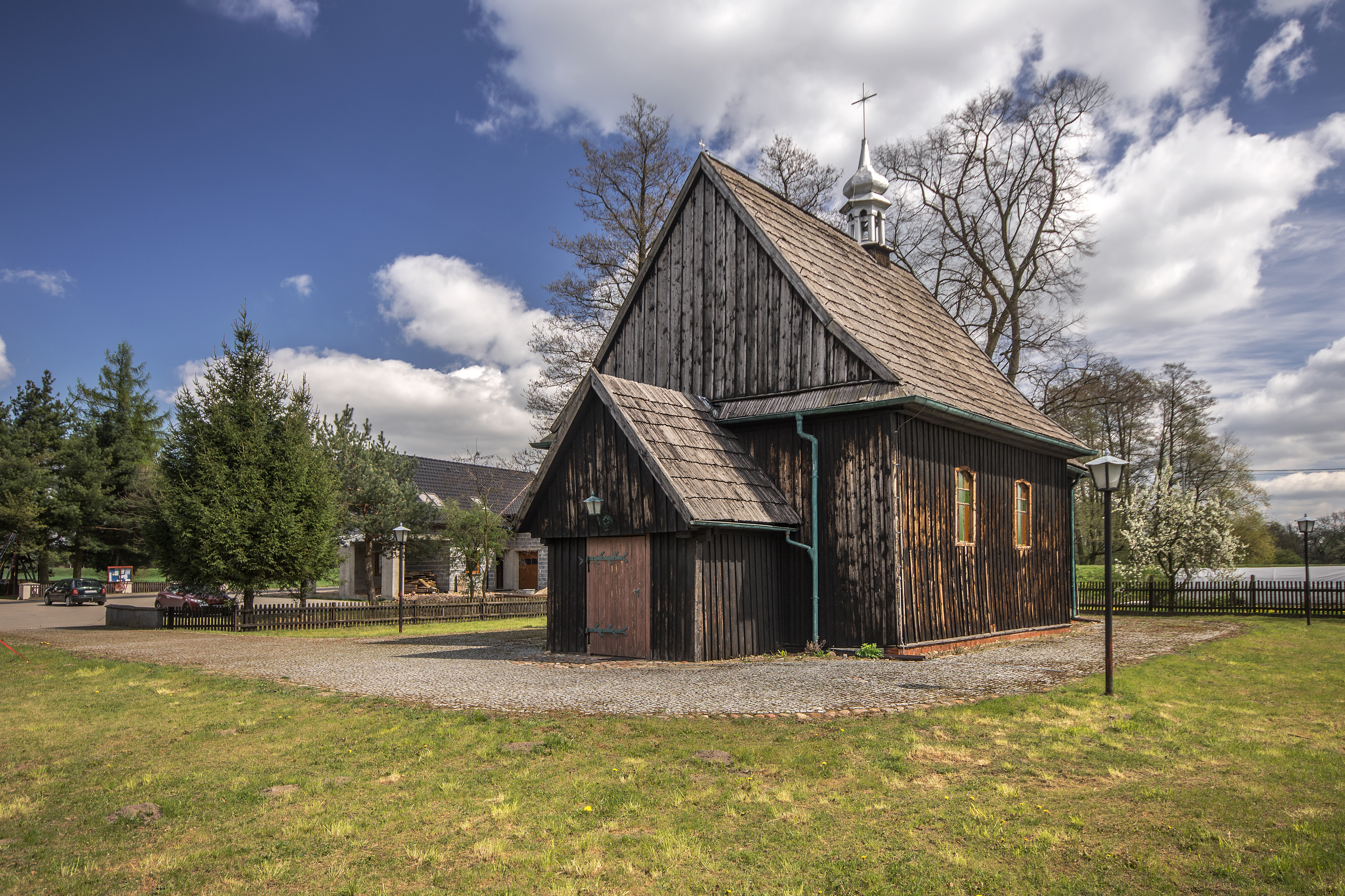 Siedlików, kościół par. p.w. św. Andrzeja Apostoła, 1778